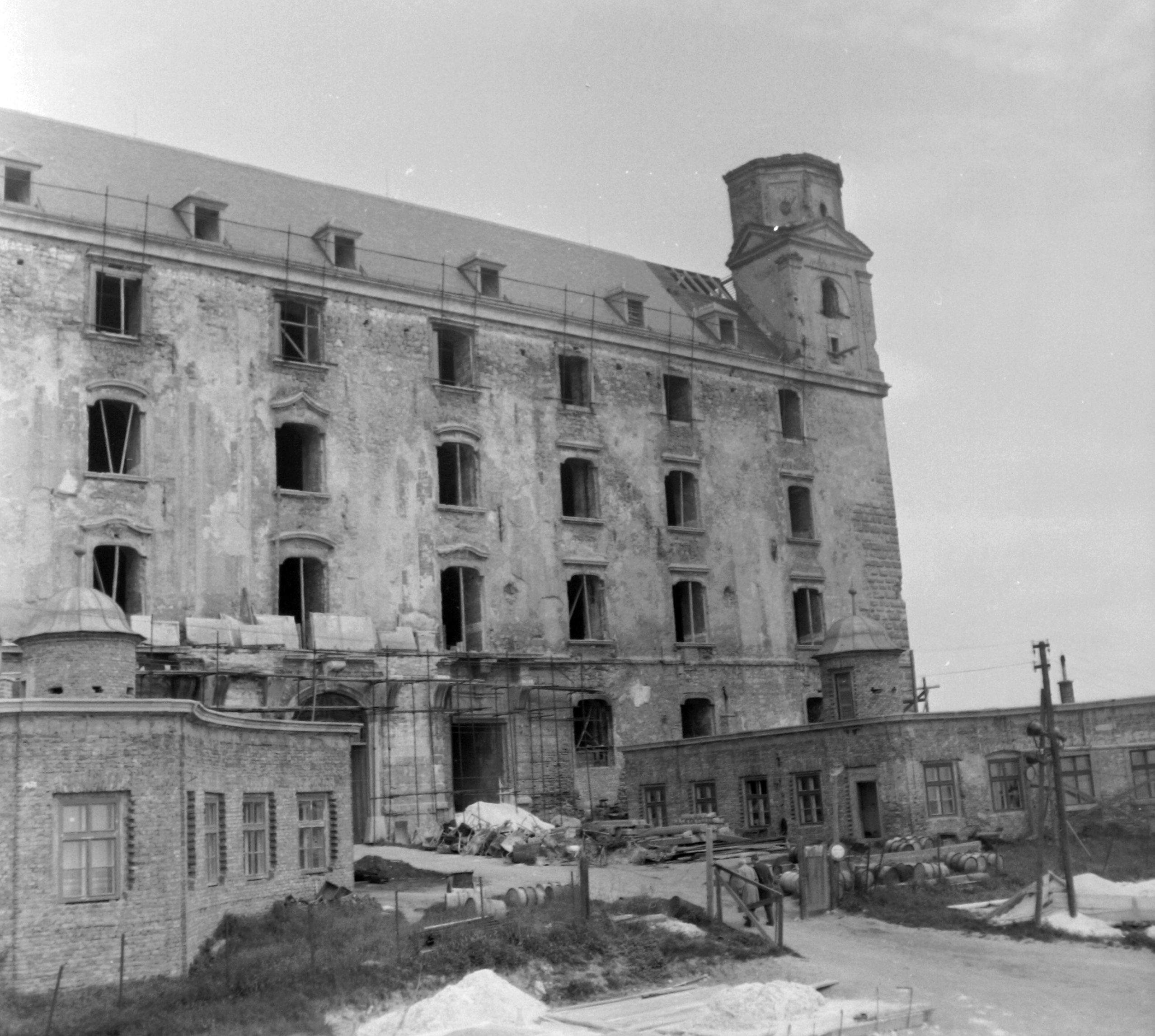 a vár déli oldala. Location: Slovakia, Bratislava Tags: Czechoslovakia, scaffold, construction, castle Title: a vár déli oldala.